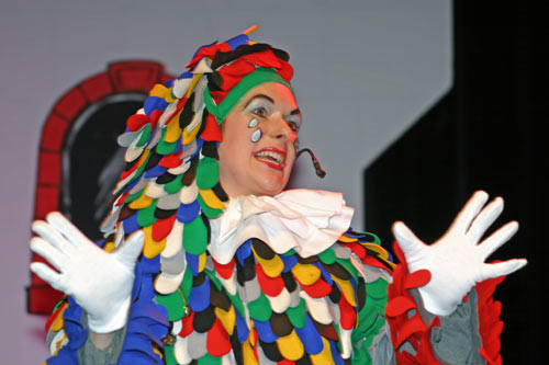 Narr der Althistorischen Narrenzunft während der Redoute in Offenburg.